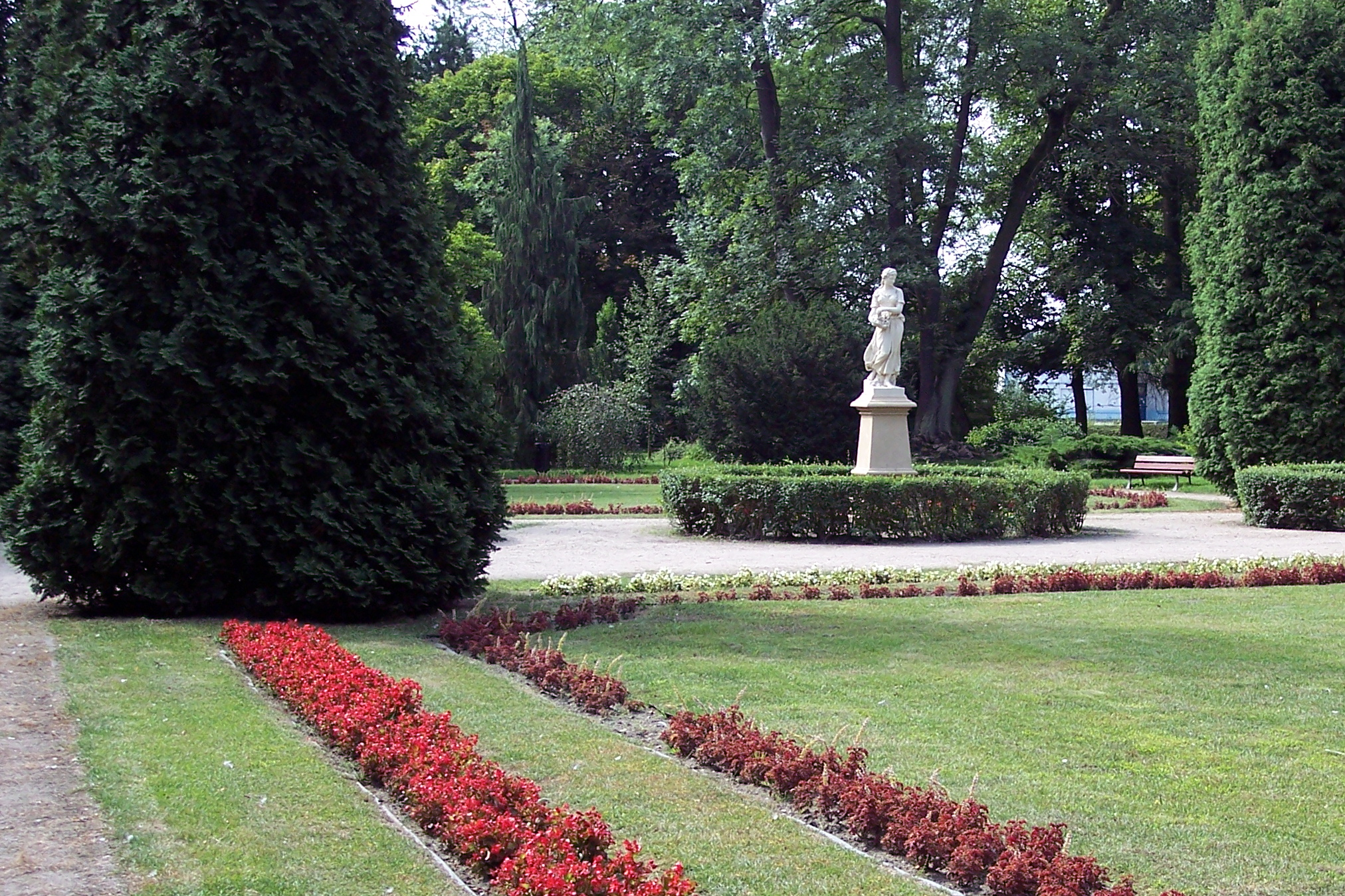 Park miejski w Kaliszu. Rzeźba Flory (aktualnie kopia) oryginał przeniesiono na plac ratuszowy.